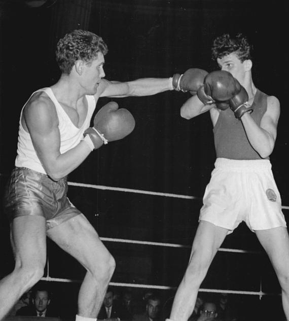 Czepanski, Martsch Zentralbild Wendorf 29.10.60 Box-Länderkampf Polen-DDR der "B"-Mannschaften im Klubhaus der Jugend und der Sportler in Berlin am 28.10.60. Der Kampf endete 10:10-unentschieden. UBz: Im Leichtgewicht wurde der Polen Czepanski (links) Sieger nach Punkten über Martsch.